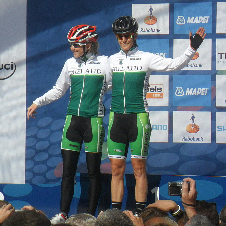 Ploegenpresentatie Ierland voor de start van het Wereldkampioenschap 2012 in Valkenburg, Nederland.